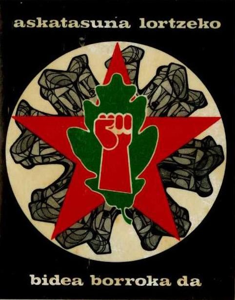 Logo de KAS